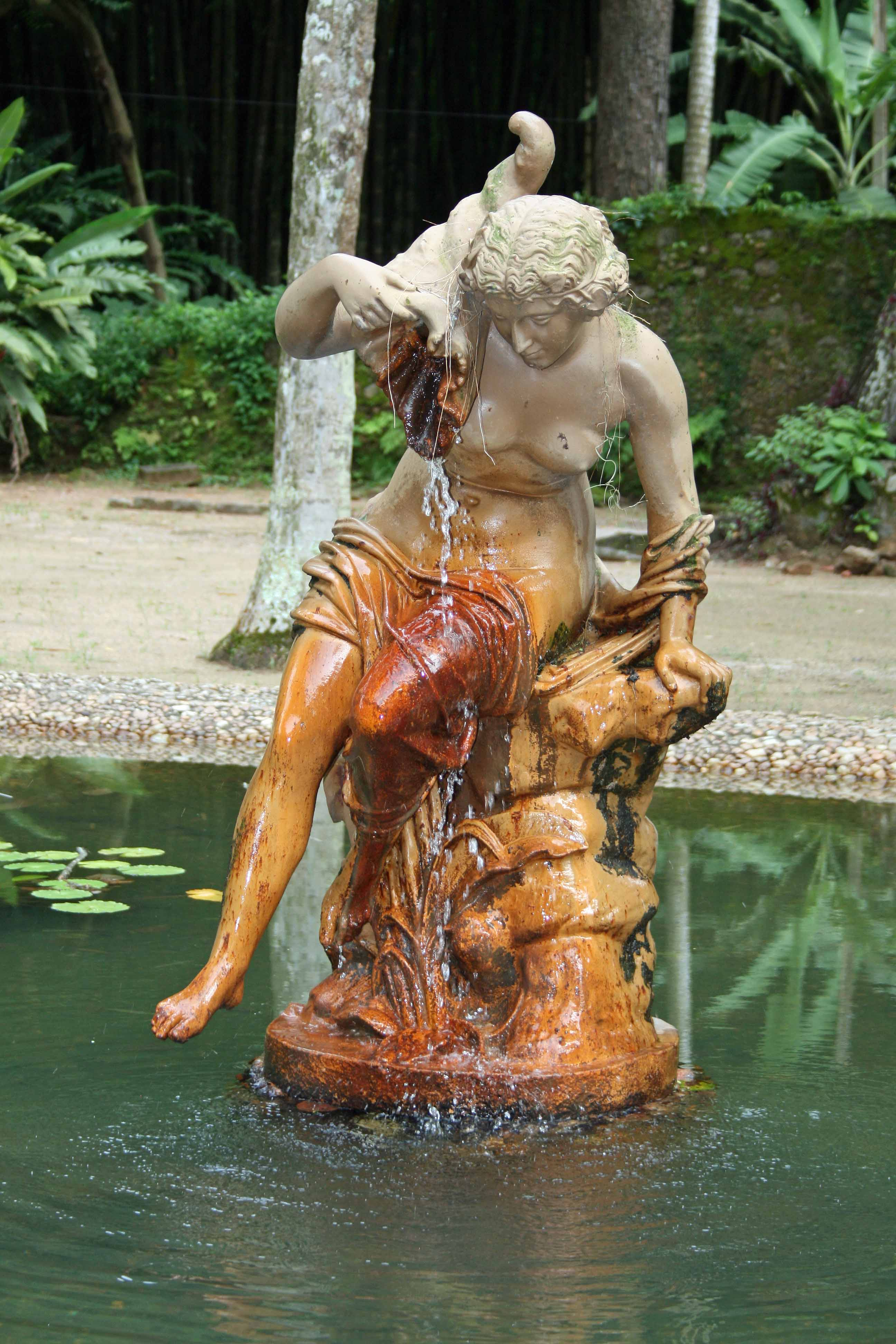 Jardim Botânico do Rio de Janeiro - Fonte A Moça com Concha de Pierre Loison.